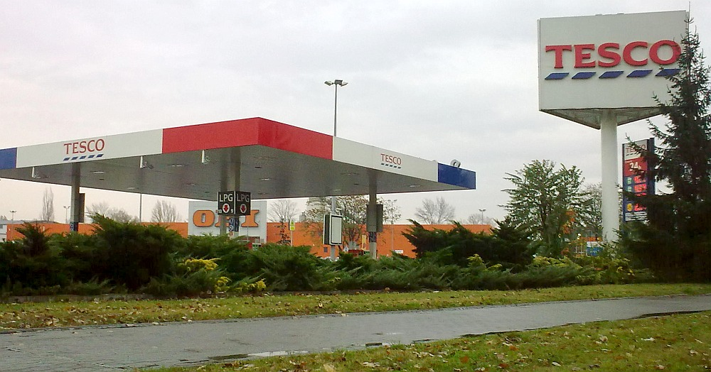 ul. Długa stacja benzynowa przy Tesco